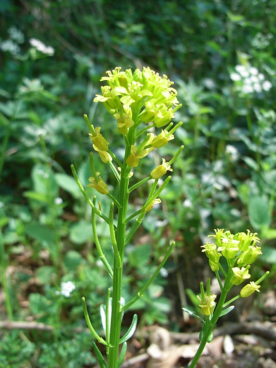 Barbarakraut (Barbarea vulgaris)